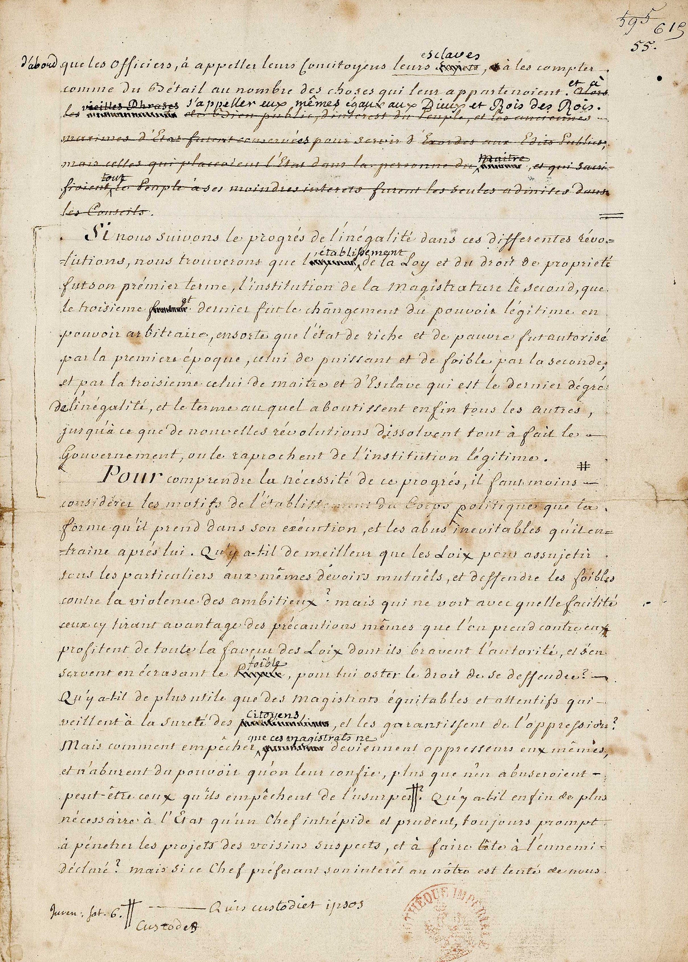 Manuscrit autographe. BNF, département des Manuscrits, Français 12760, f. 615.